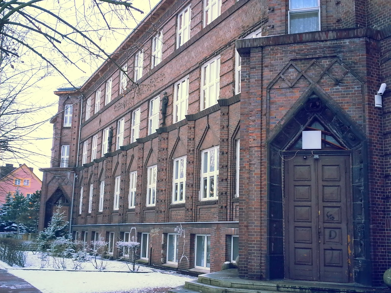 szkoła publiczna